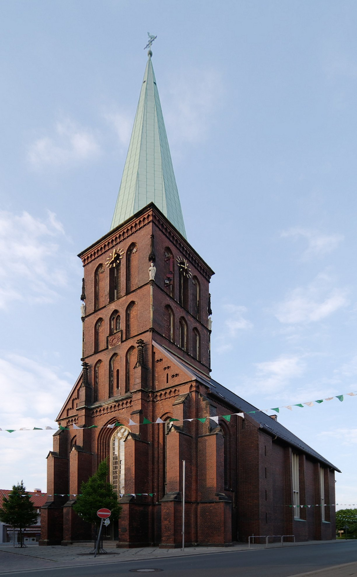 St.Pankratius-Kirche in Hamm-Bockum-Hövel